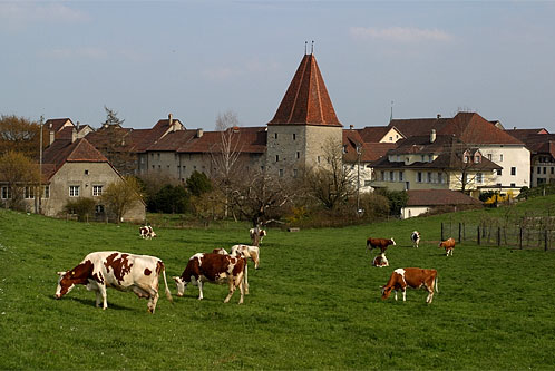 Blick auf Wiedlisbach mit dem Wohnturm